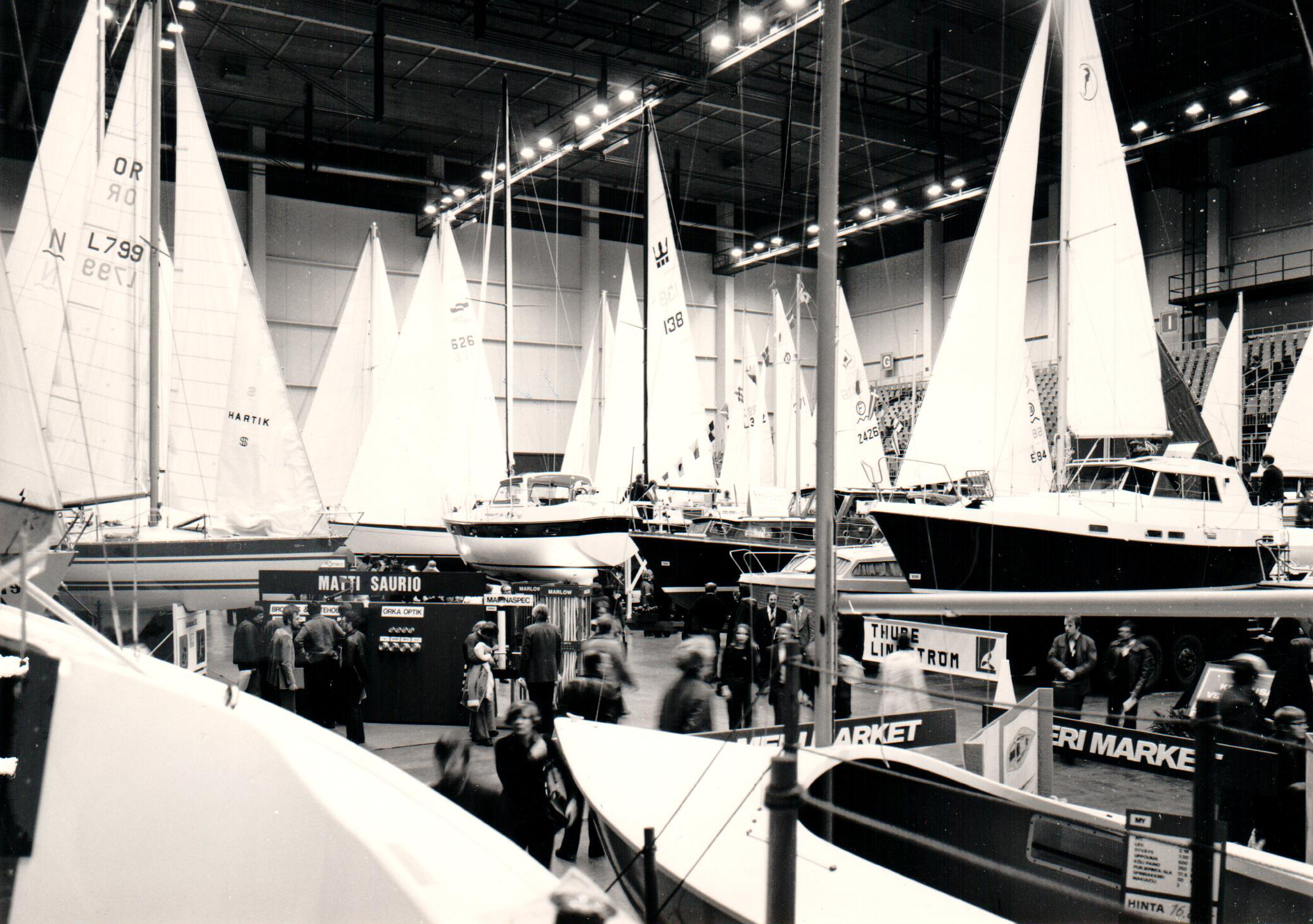 Ensimmäiset messut Pasilassa